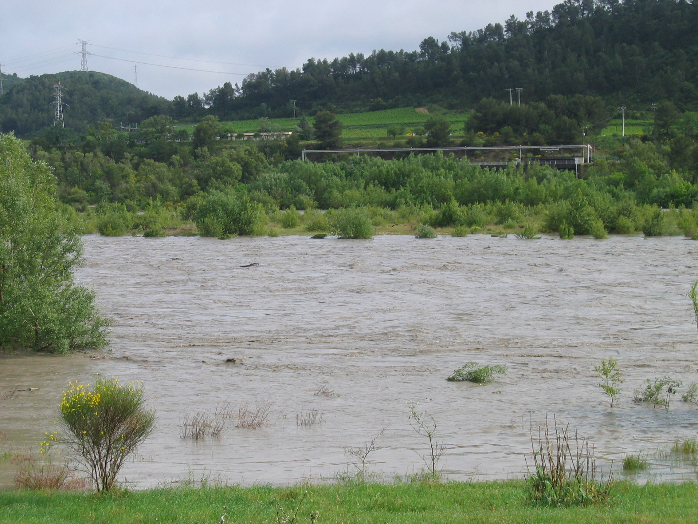 La Durance, rivière du sud-est de la France, en cru.